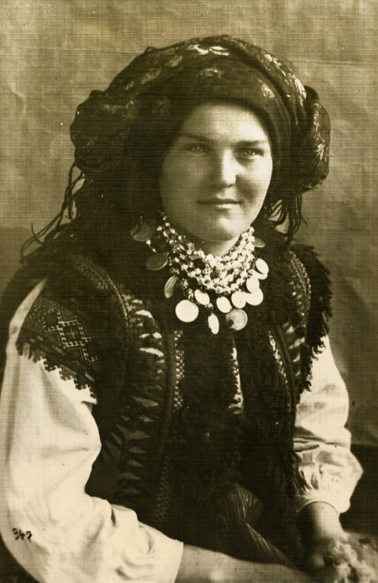 Дореволюционная открытка Российской империи из серии «Малороссийские типы».